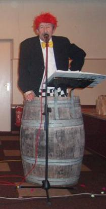 Tonpraoter